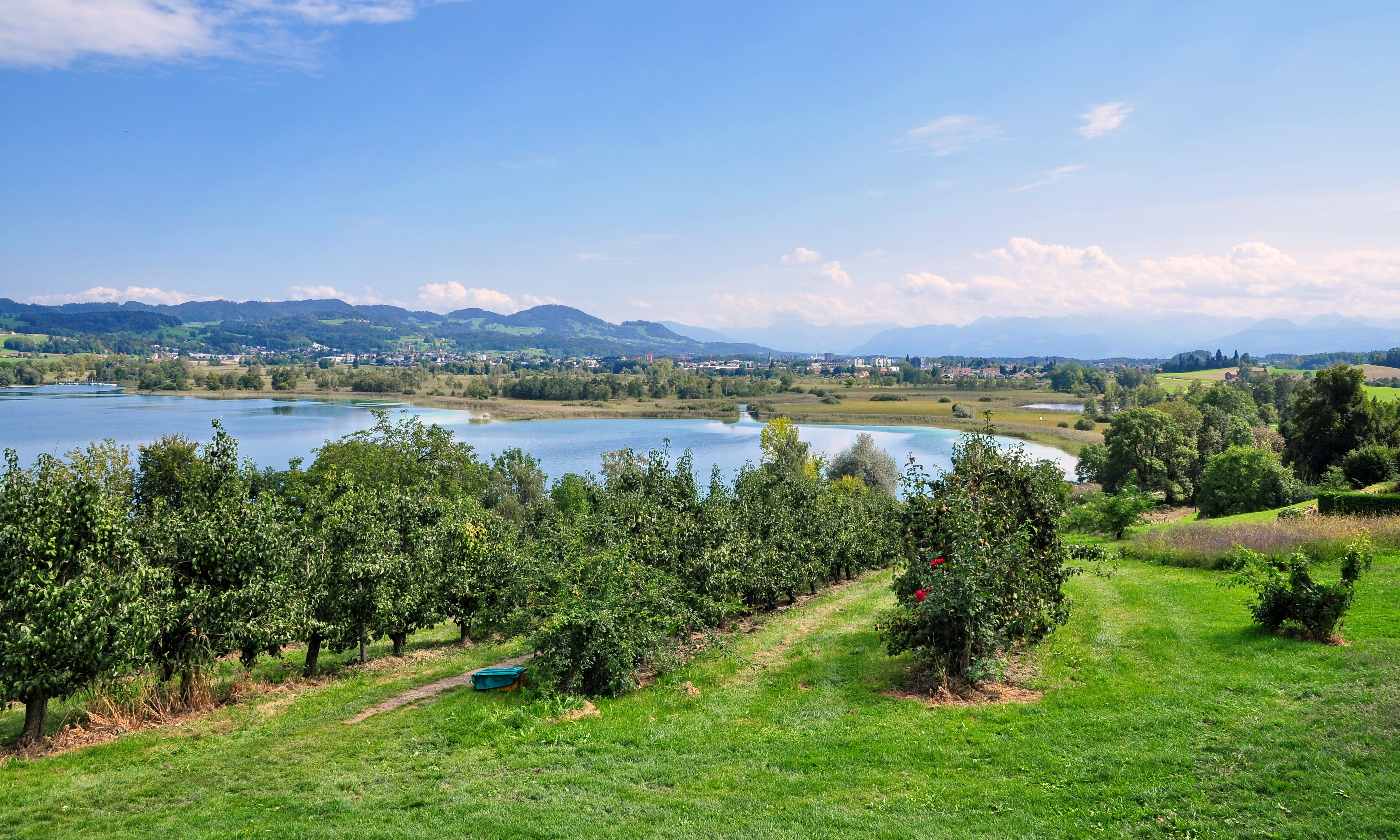 Robenhausen, neolithische und bronzezeitliche Seeufersiedlungen in Wetzikon (Switzerland)